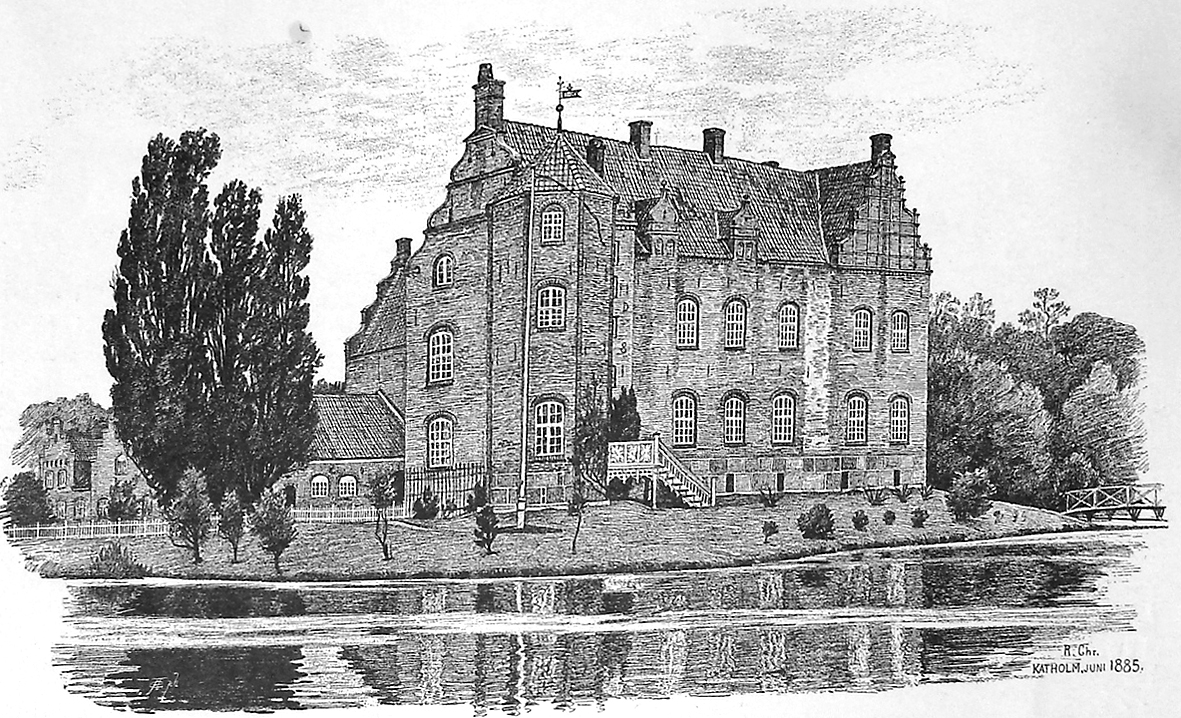 Katholm er en gammel sædegård, som er oprettet i 1545 af Christen Fasti. Katholm ligger i Ålsø Sogn i Norddjurs Kommune. Hovedbygningen er opført i 1588-1591 og tilbygget i 1622.